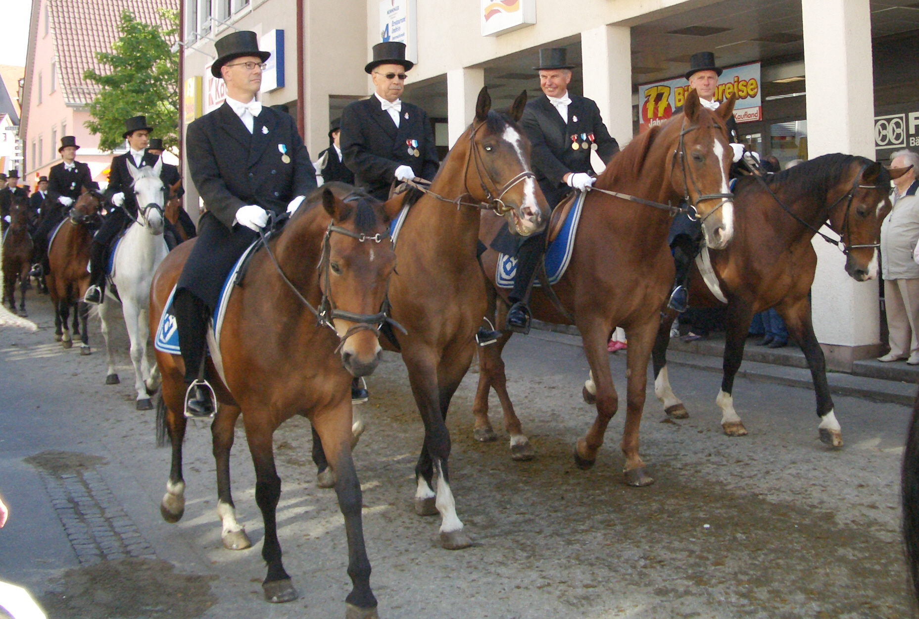 Blutritt Weingarten, Blutreiter der Blutreitergruppe Ravensburg